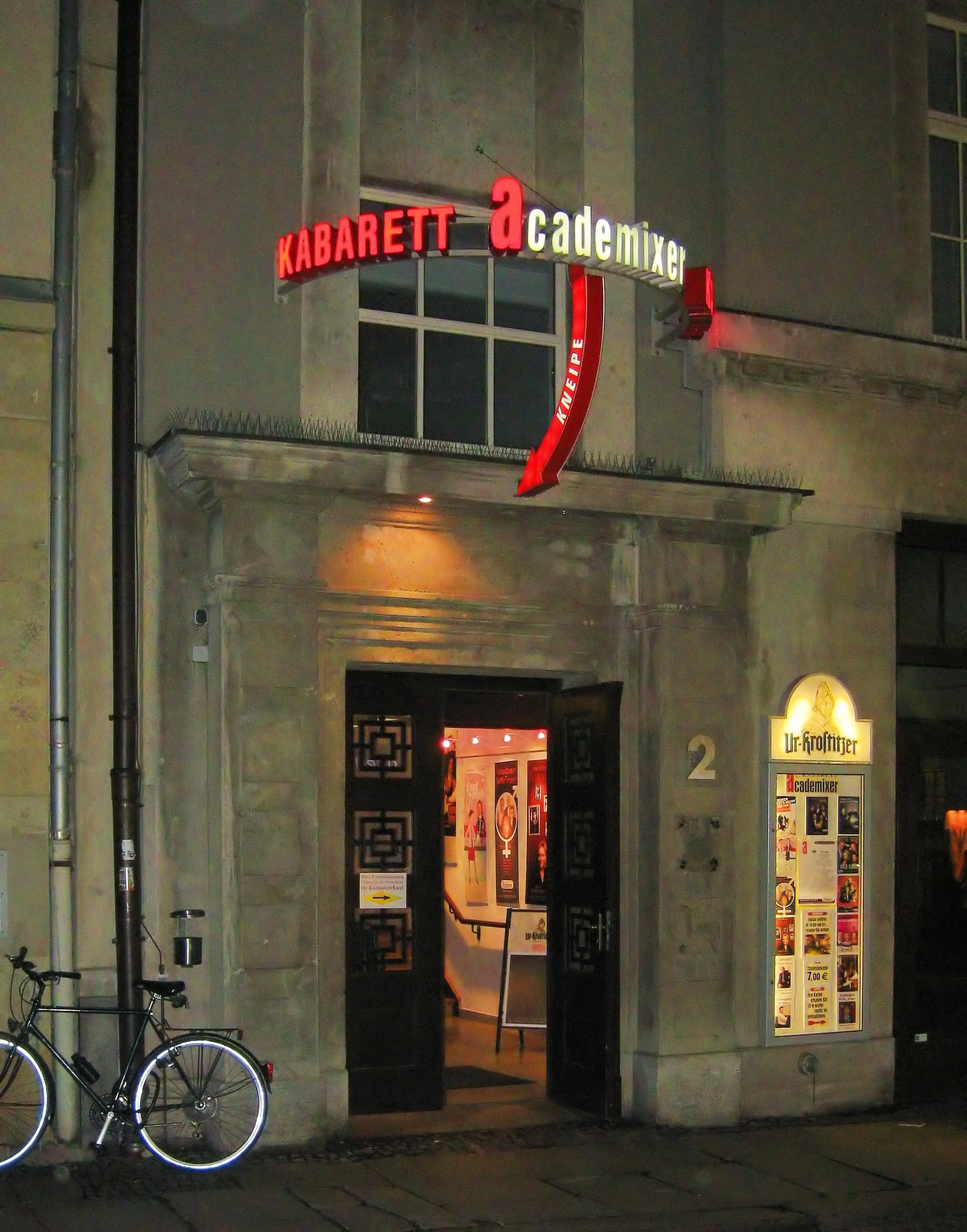 Eingang zum academixer-Keller (Spielstätte des Kabaretts "academixer") in Leipzig, Deutschland.